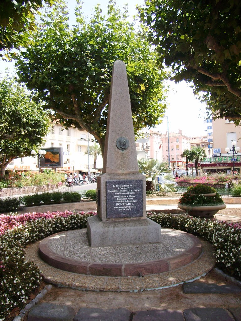 Pyramide Bonaparte de Saint-Raphaël (83)